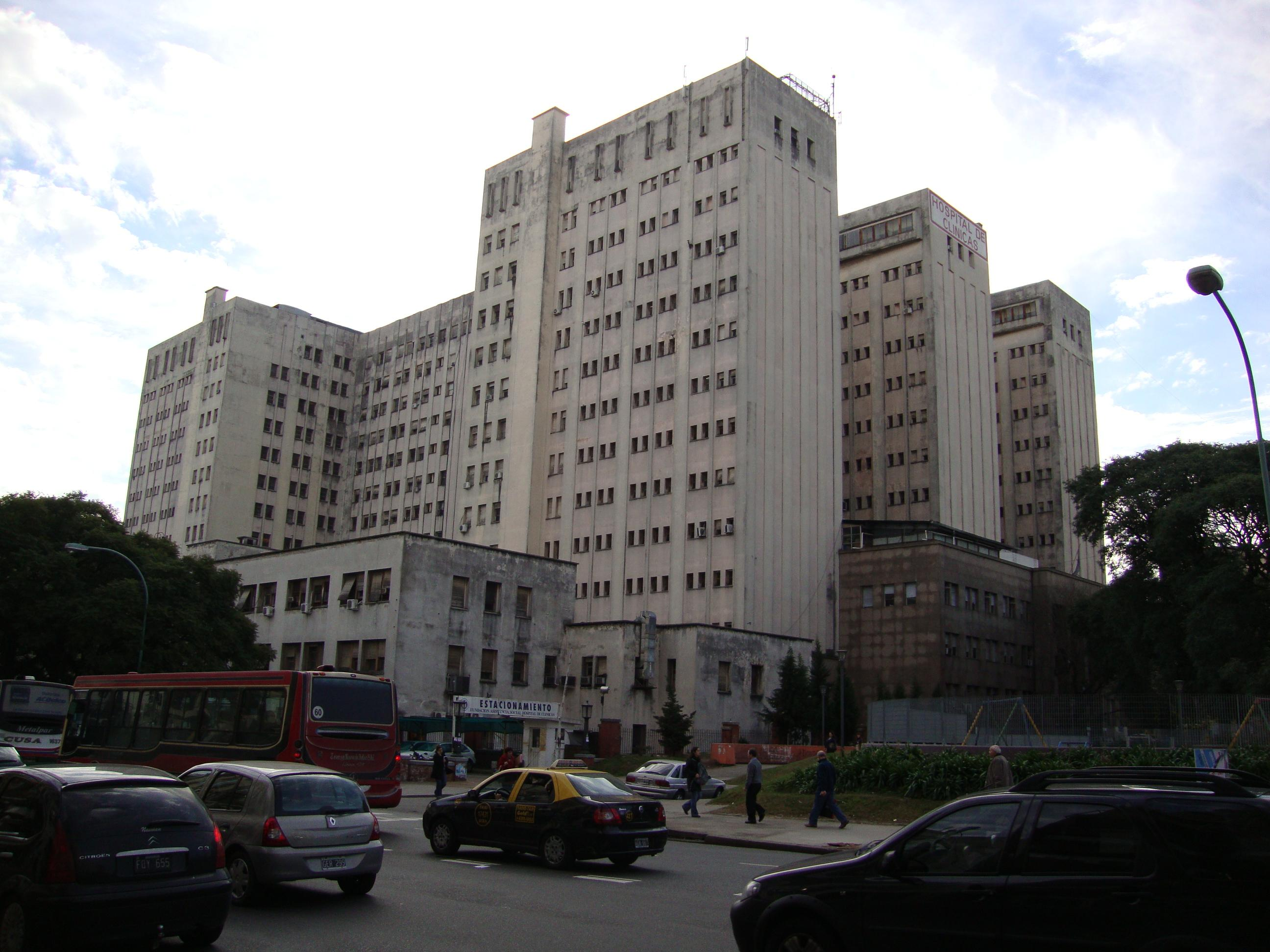 Vista del Hospital de Clínicas José de San Martín, dependiente de la Universidad de Buenos Aires. Imagen tomada desde la esquina de Presidente Uriburu y Avenida Córdoba hacia el noroeste. Buenos Aires, Argentina